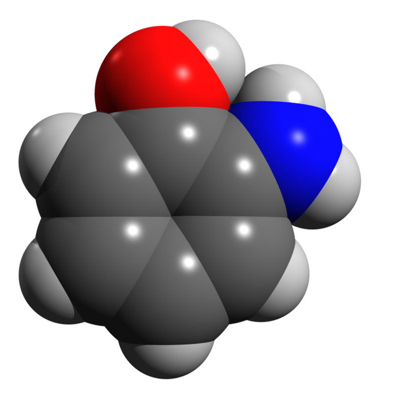 Aminofenol3D